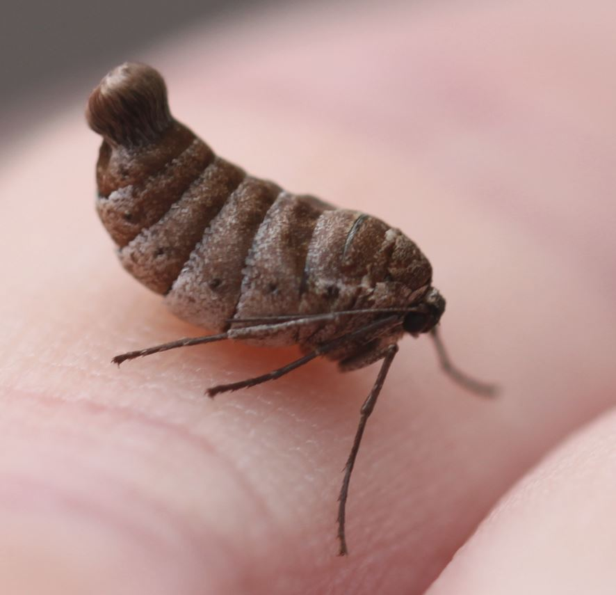 Weibchen des Frühlings-Kreuzflügels (Alsophila aescularia), am 1. März 2019 in Walldorf/Baden